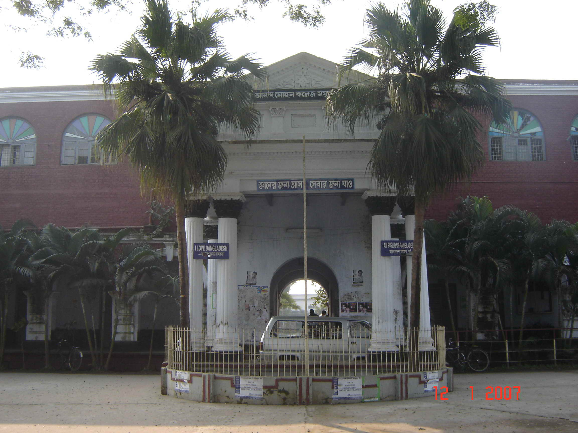 Ananda Mohan College at Mymensingh in Bangladesh